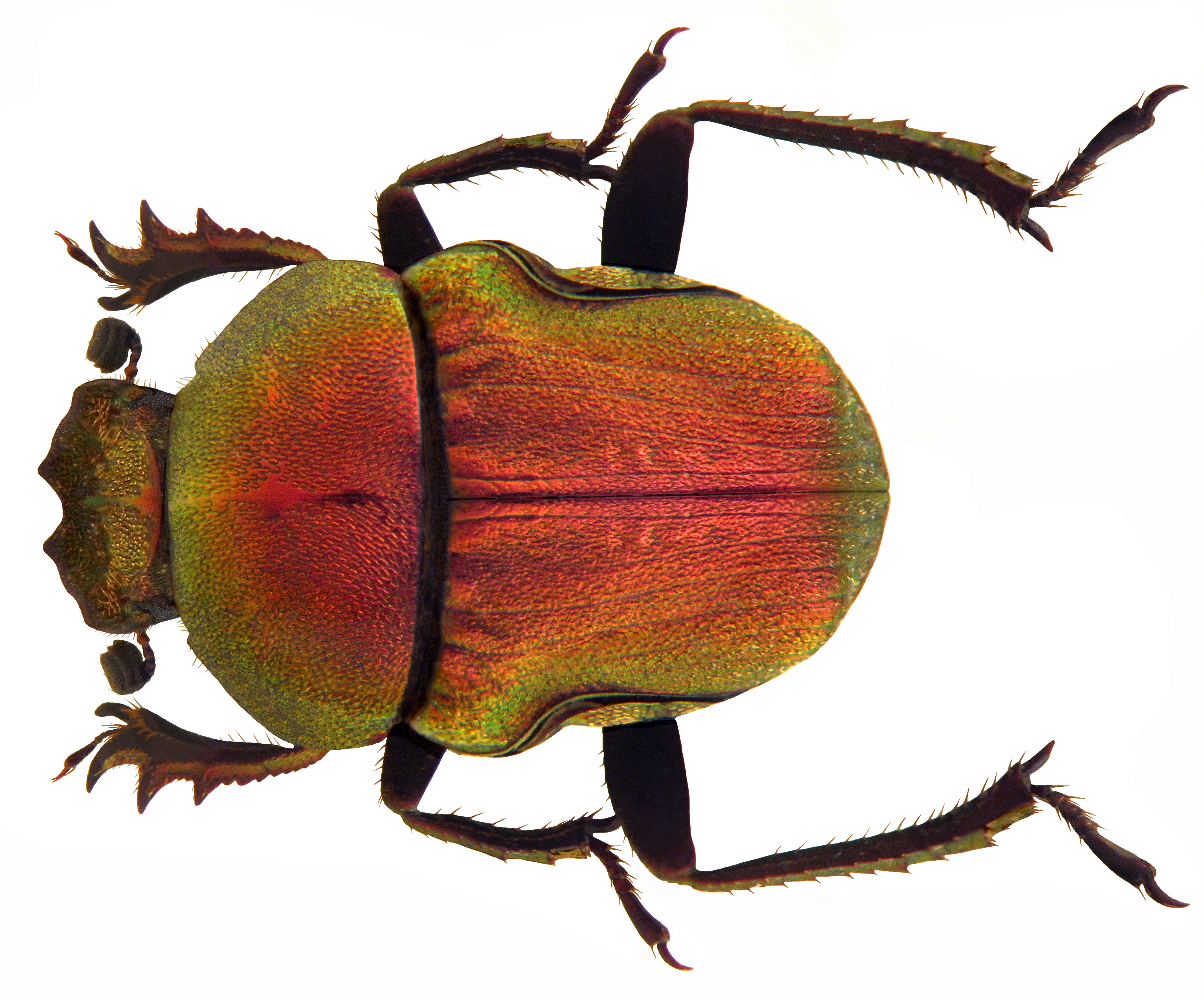 Familie: Scarabaeidae Groesse: 9,4 mm Verbreitung: südliches Afrika Fundort: Namibia, Otjiwarongo, Waterberg leg.det. U.Schmidt, 1994 Foto: U.Schmidt, 2010